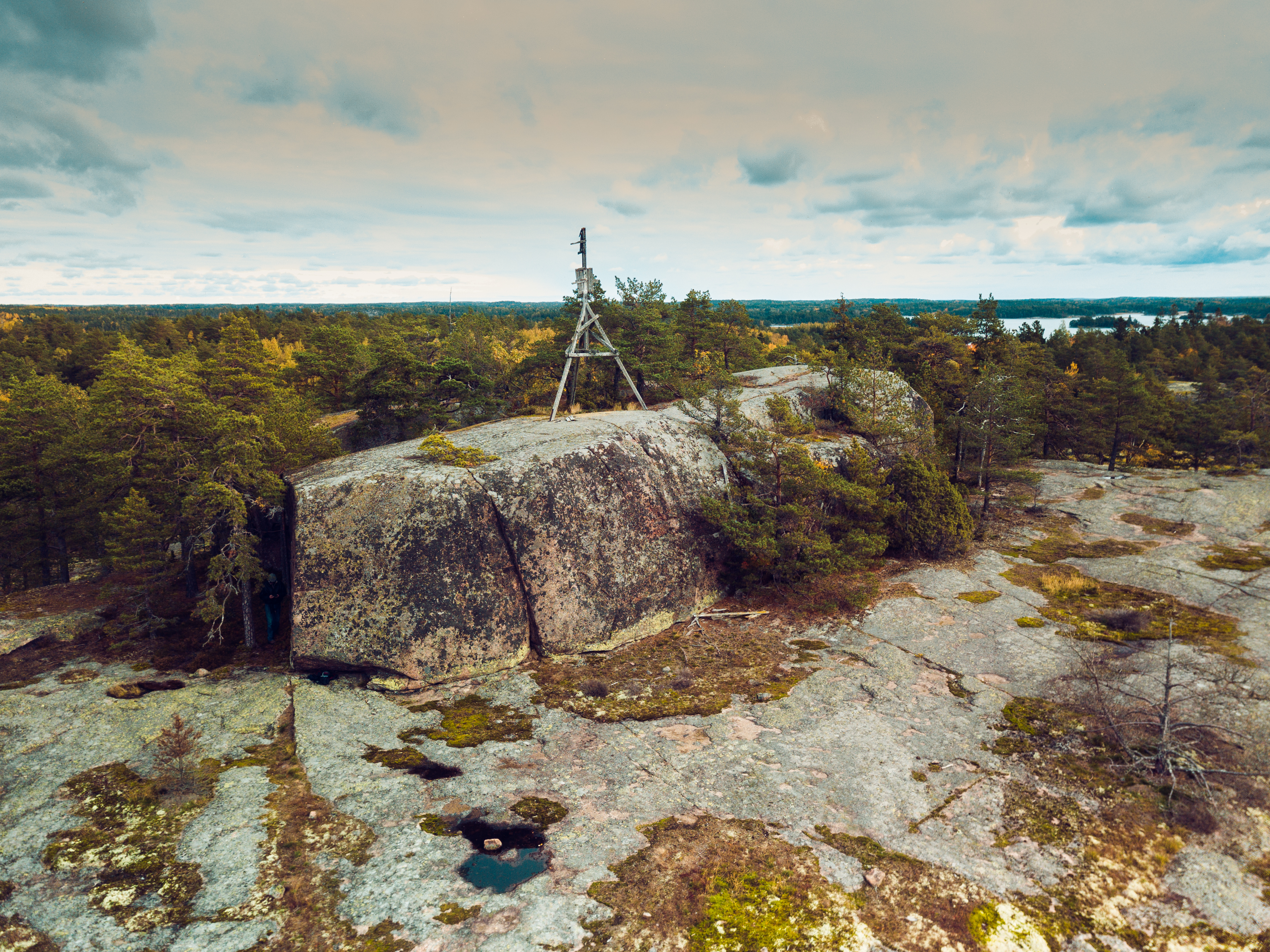 Vidare flygbild på Smörasken och sjömärket från sidan. Smörasken är ett berg på ön Högsar med ett stort flyttblock på toppen. Smörasken är en fin utsiktsplats och ett populärt utflyktsmål.